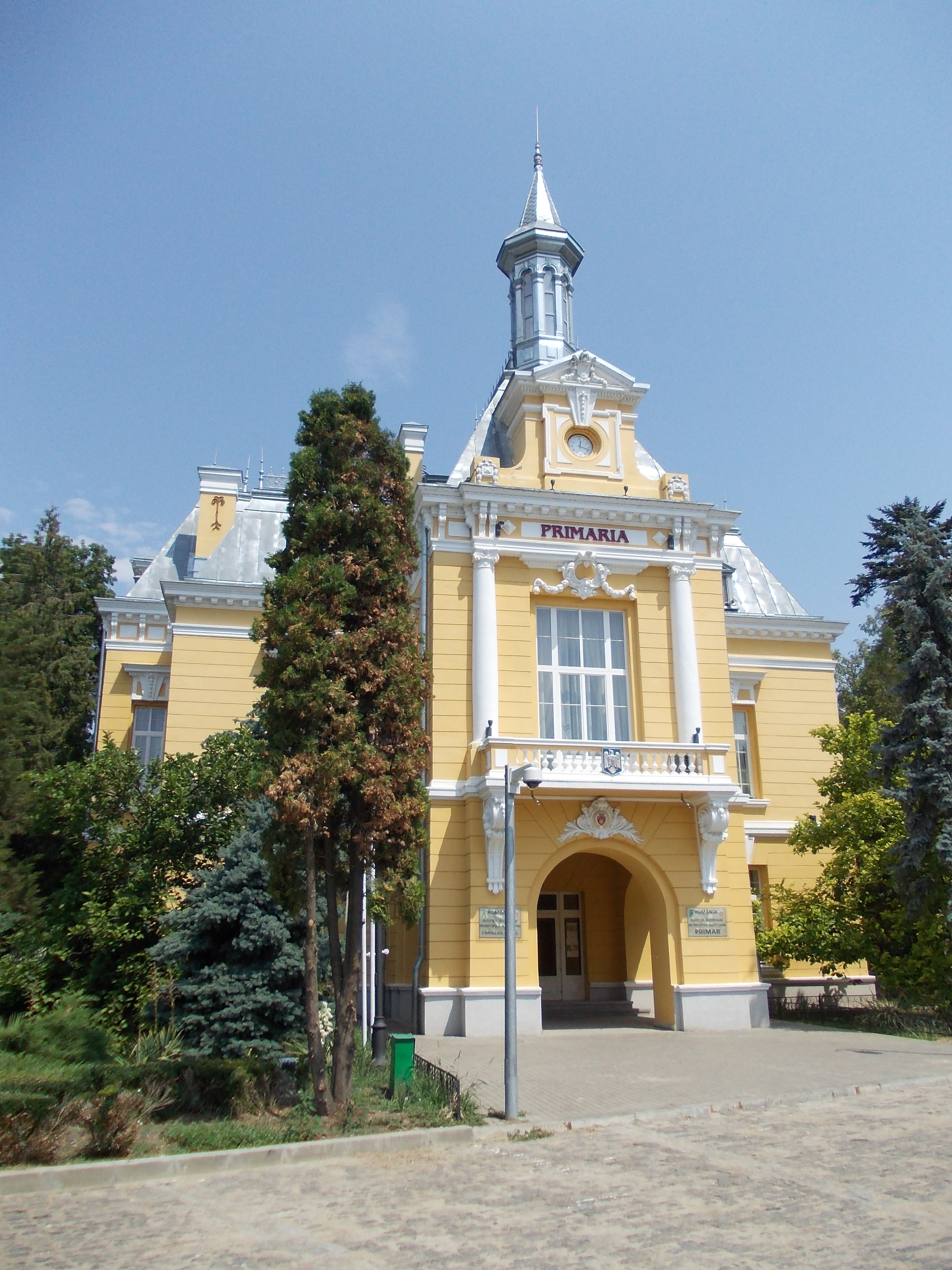 Primăria oraşului Botoşani